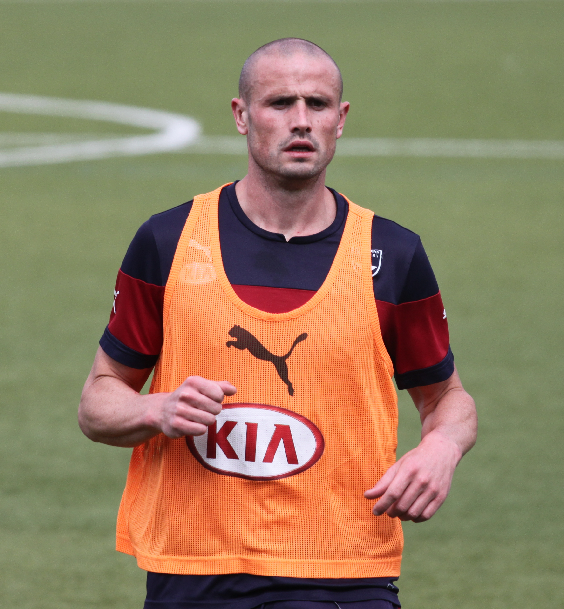 Pallois à l'entraînement.